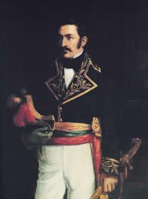 Portrait of José Félix Ribas